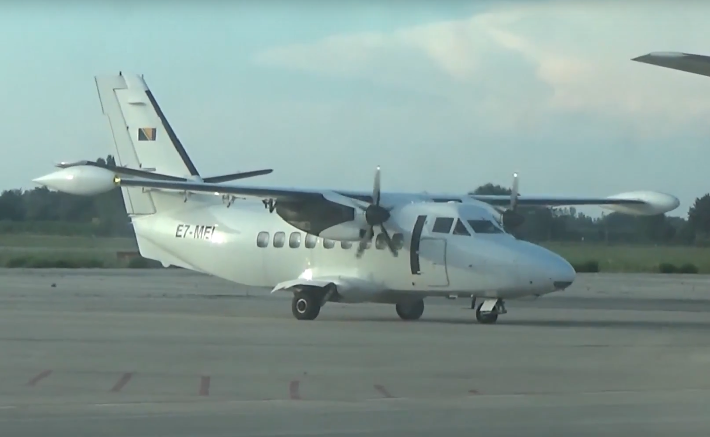 Eine Let L-410 der Icar Air